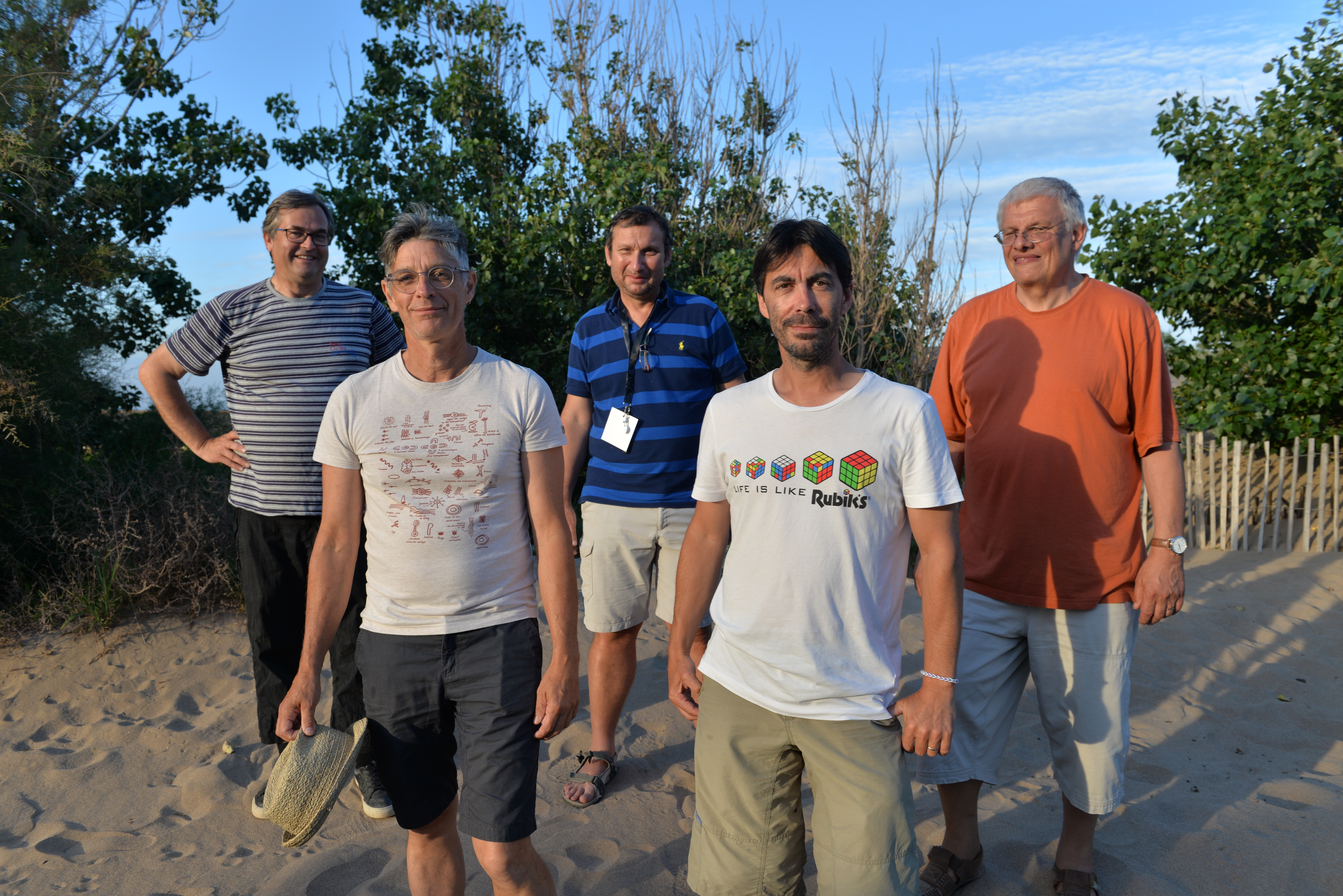 Les cinq derniers secrétaires généraux du SNE-FSU lors du congrès du SNE de Sérignan (34) en mai 2017